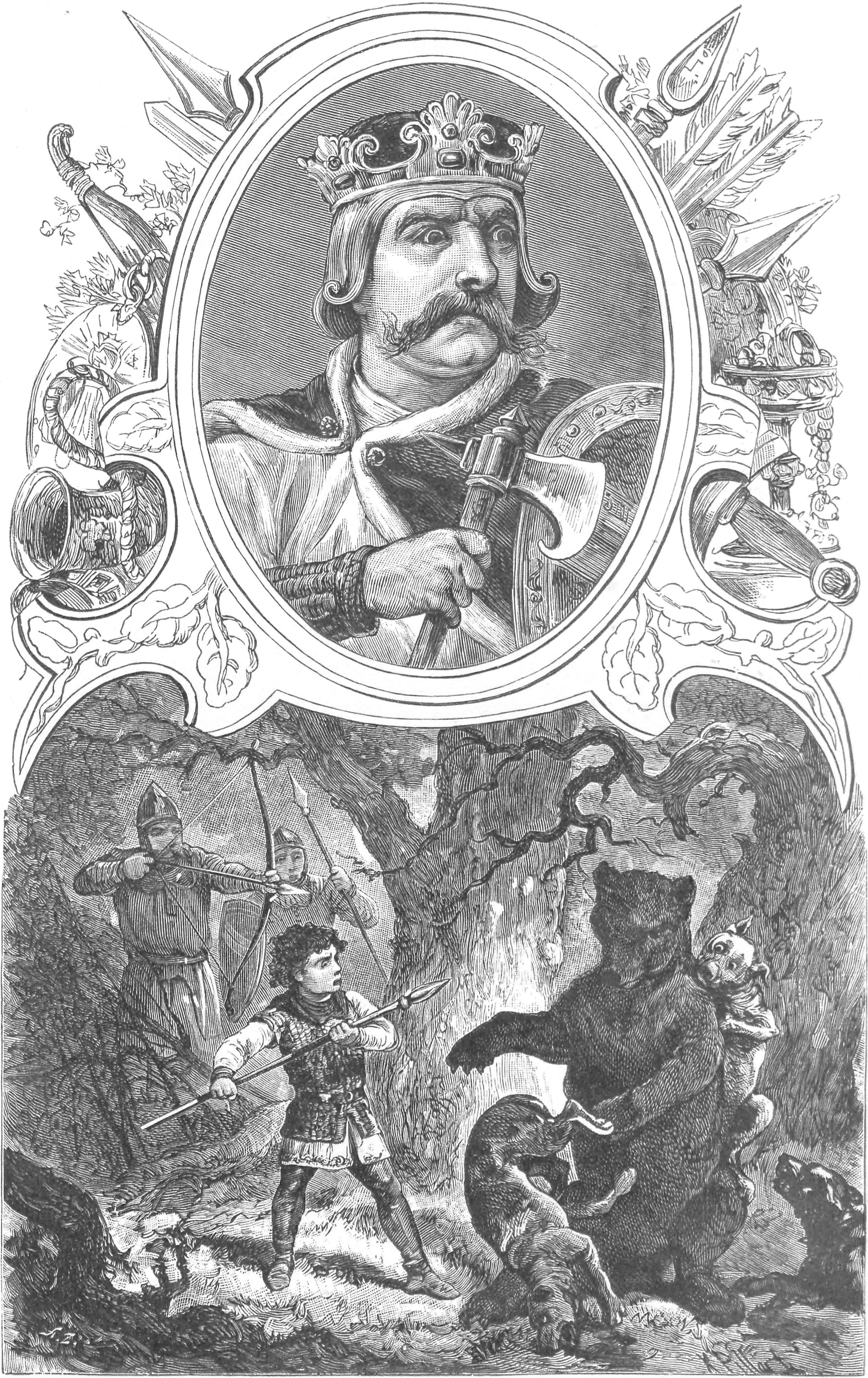 ilustracja z książki „Wizerunki książąt i królów polskich“